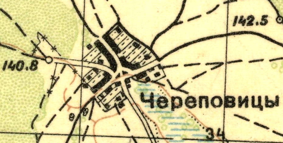 Топографическая карта Ленинградской области, квадрат О-35-23-Г (Волосово), деревня Красные Череповицы